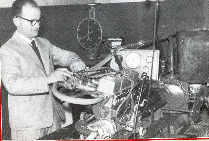 Bandini formula junior engine & Ilario Bandini picture from Bandini book